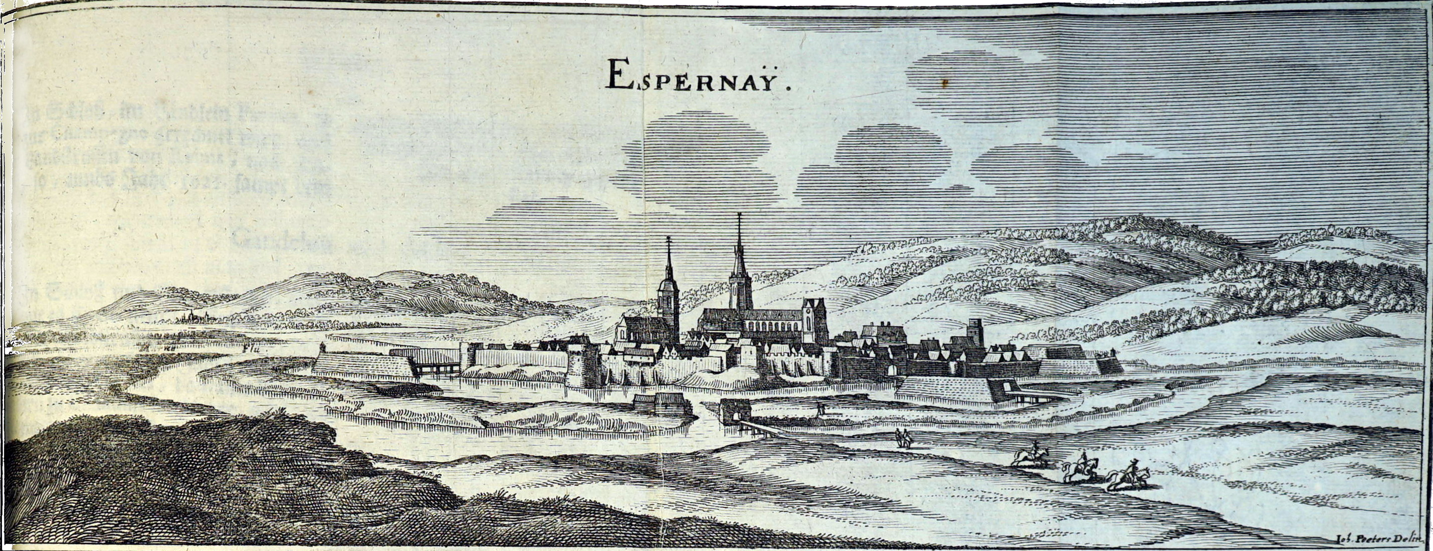 image extraite du livre.